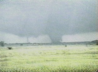 Satellite tornado